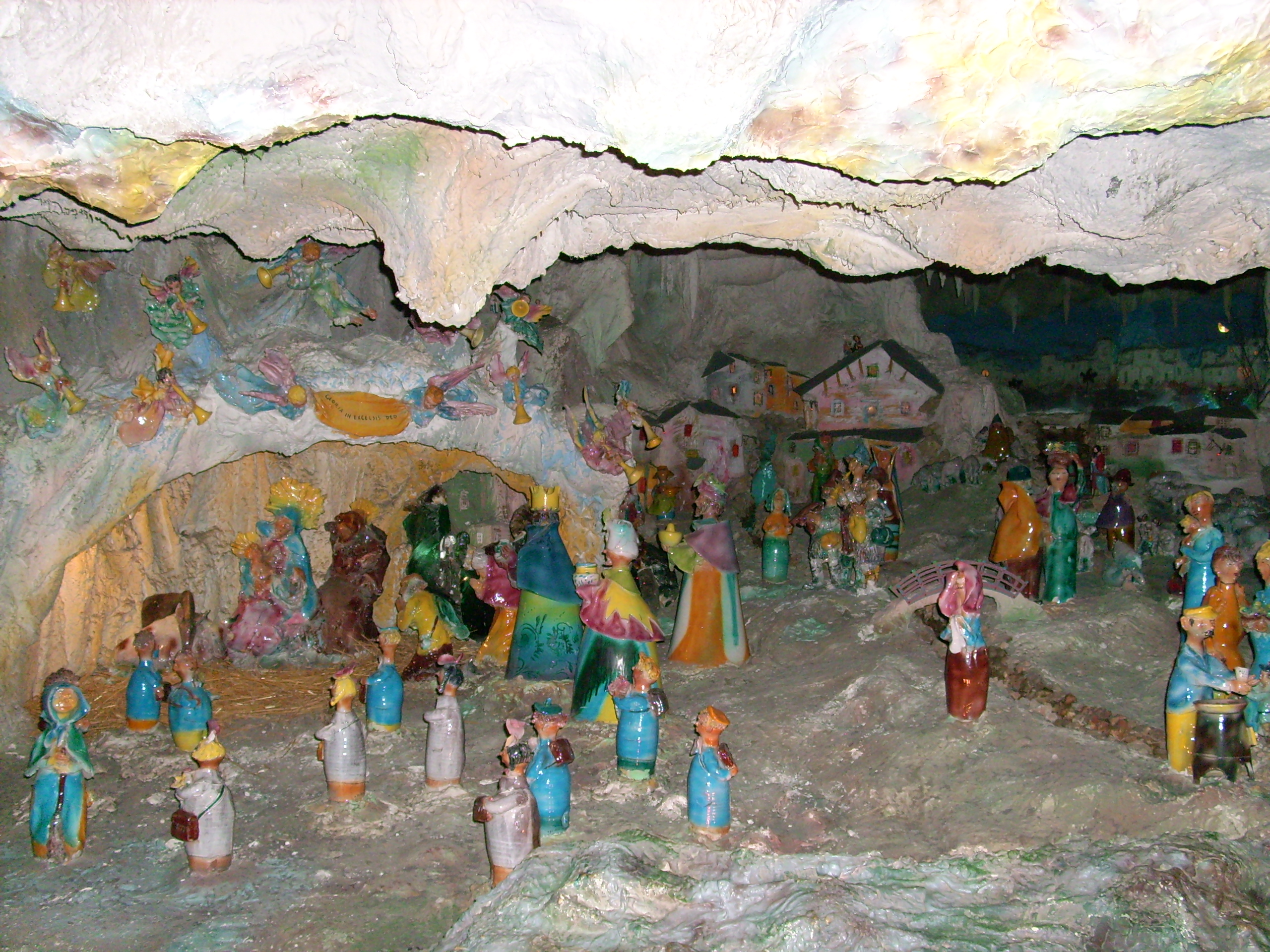 Presepio allestito presso il Santuario del Bambino Gesù di Praga ad Arenzano, Liguria, Italia